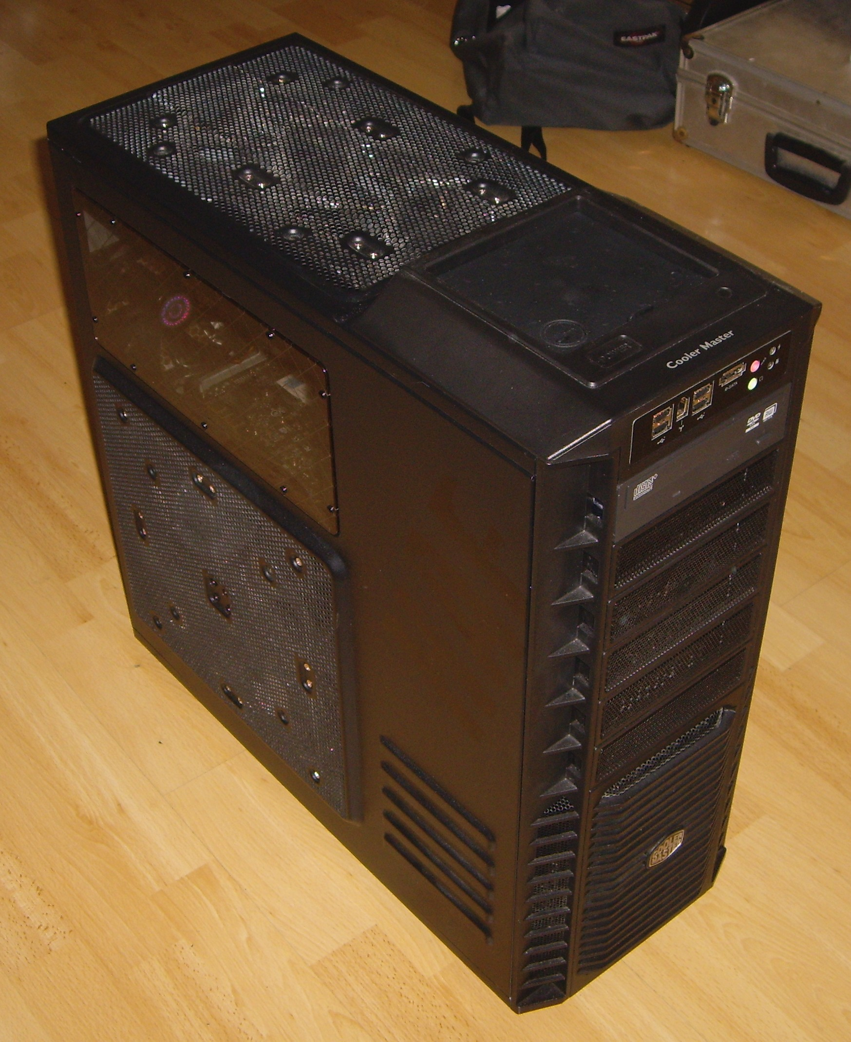 Il s'agit d'une boîtier Cooler Master HAF 932.